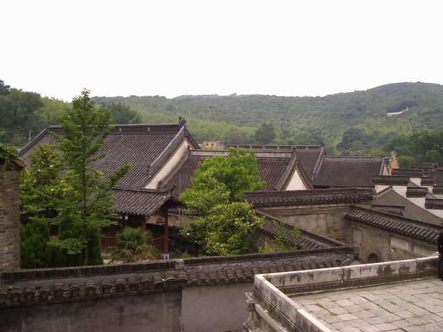 隆昌寺 無梁殿の2階からの風景 2004年6月5日撮影 撮影者：権作 参照：